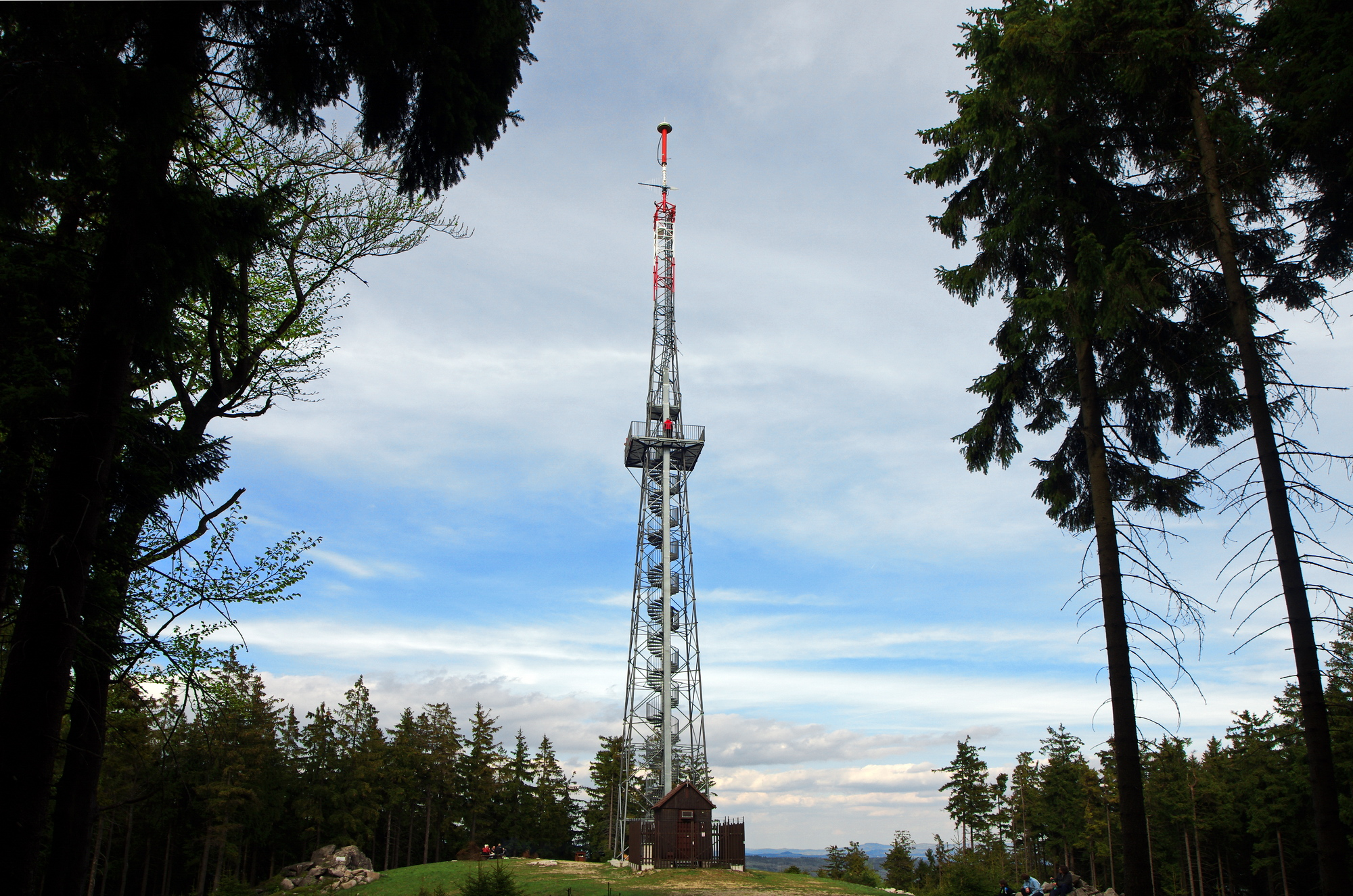 rozhledna Krudum, Slavkovský les, okres Sokolov